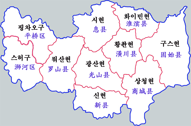 신양시 현급행정구역도